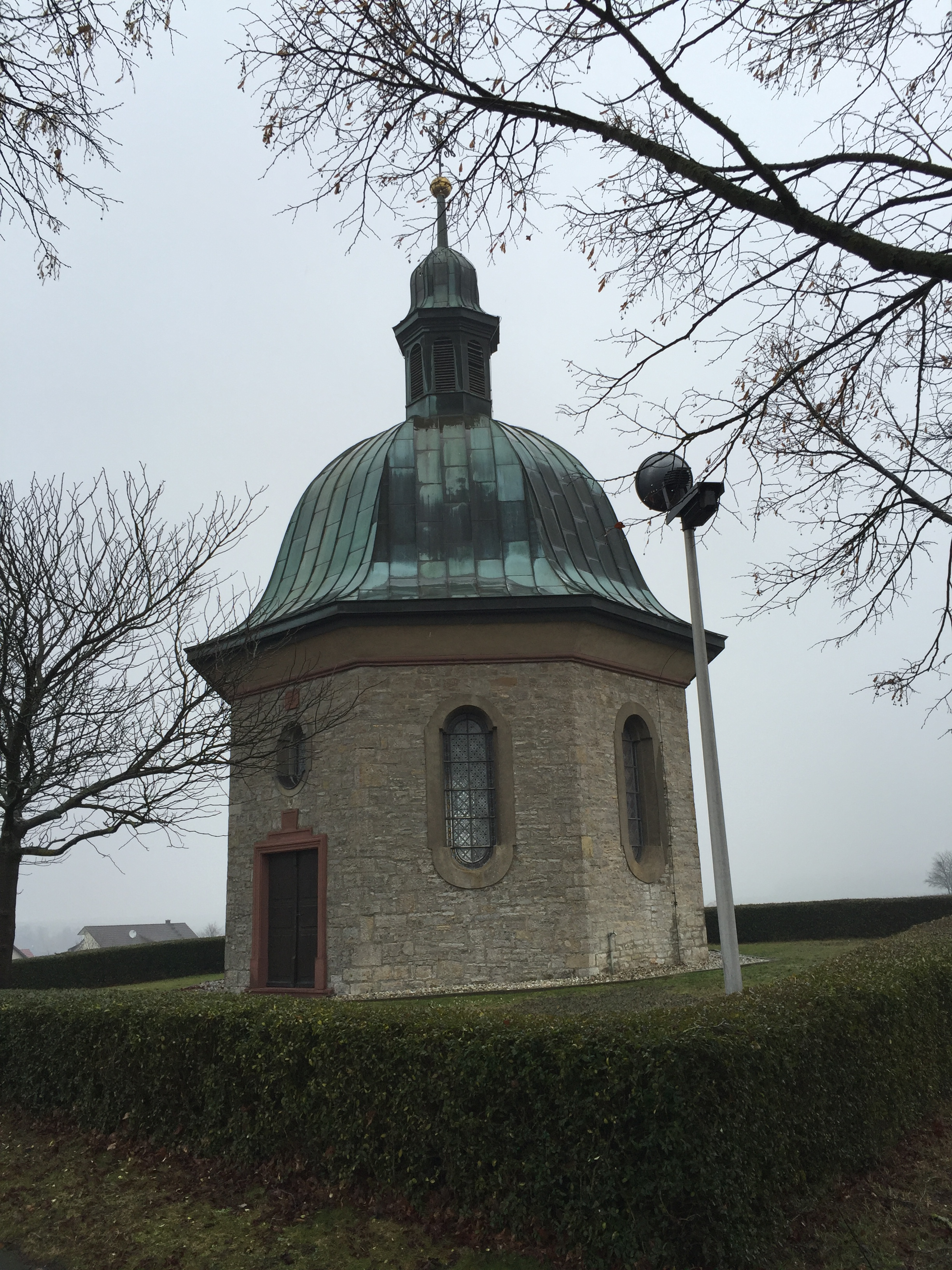 Kleindenkmal Nr. 14 (Gerchsheim): Kapelle Maria Königin des Friedens (auch Kriegergedächtniskapelle genannt), von 1925 bis 1927 errichtet, oktogonaler Bau von 1926, Kruzifix, 1849 bez. und gusseiserne Kreuzwegstationen, um 1900. Siehe auch: Seelsorgeeinheit Großrinderfeld-Werbach: Gerchsheim Kapelle "Maria Königin des Friedens". Liste der Kulturdenkmale in Gerchsheim.